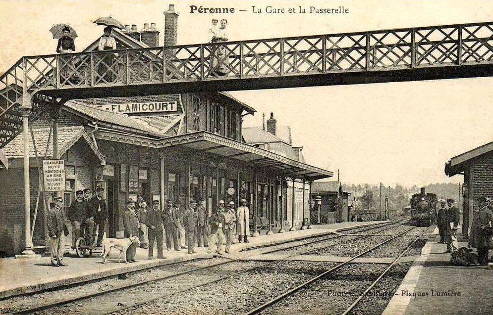 Train de voyageurs entrant dans l'ancienne gare de Péronne - Flamicourt, dont le bâtiment-voyageurs a été remplacé en 1909.